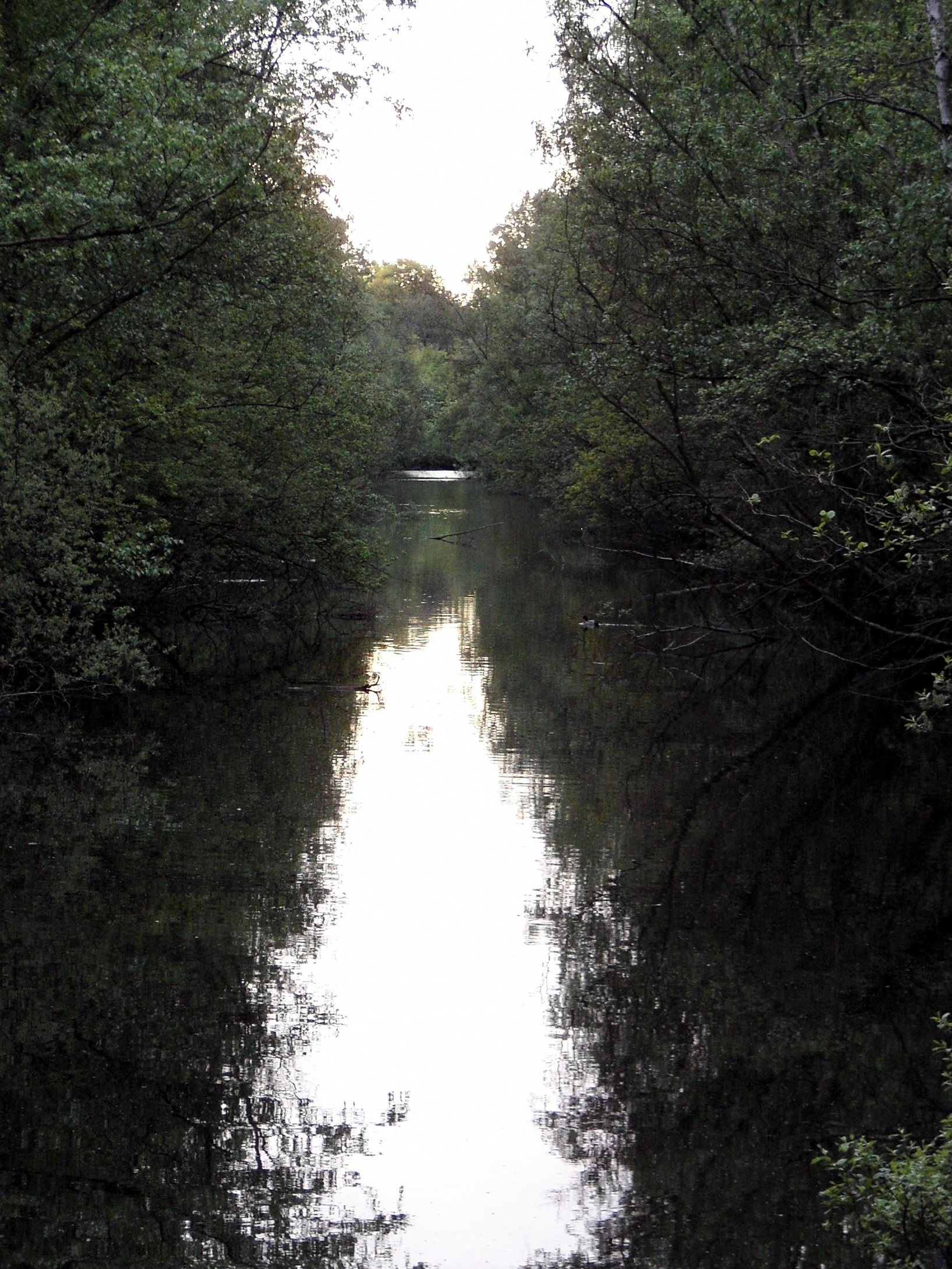 Description Antitankgracht in domein De Inslag, Brasschaat (Antwerpen)Date 9/11/2005Source Own workAuthor Johan Neegers Antitankgracht in domein De Inslag, Brasschaat (Antwerpen)